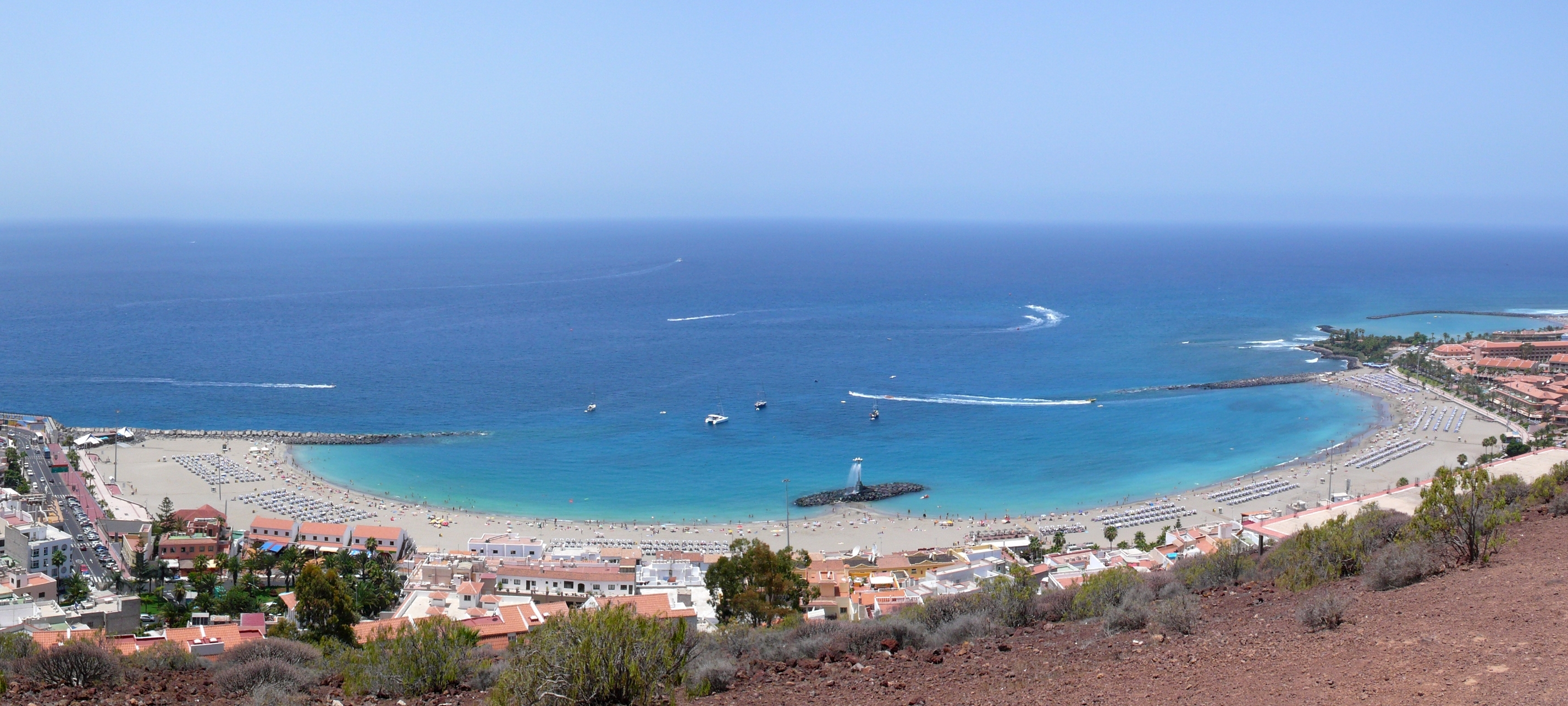 Panorámica de la Playa de Las Vistas en Los Cristianos, Tenerife, desde la Montaña Chayofita.